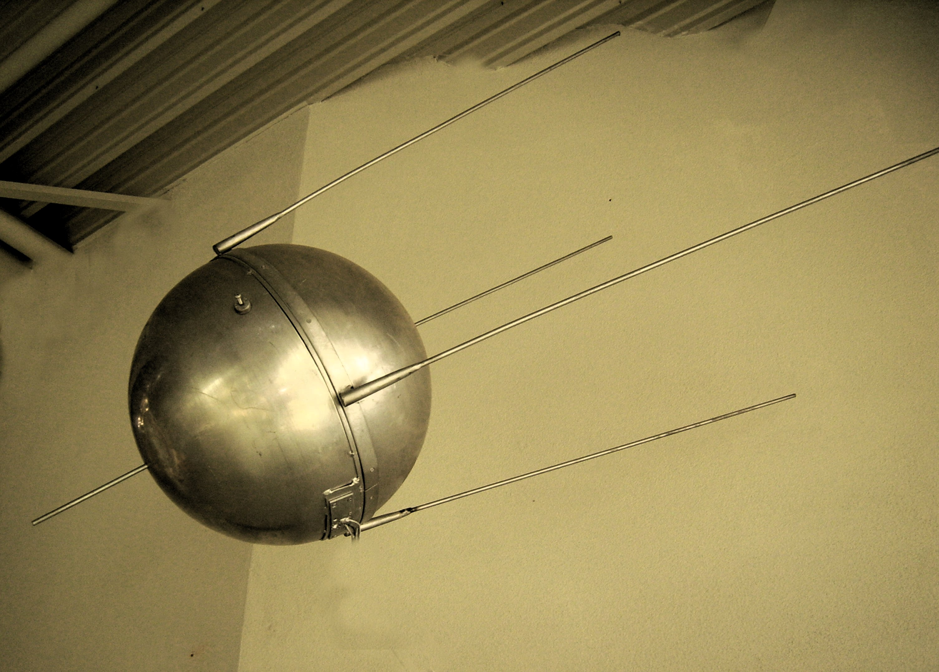 Sputnik